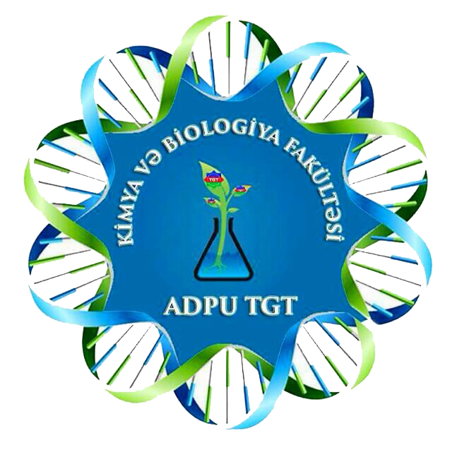 Kimya və Biologiya Fakültəsi logosu